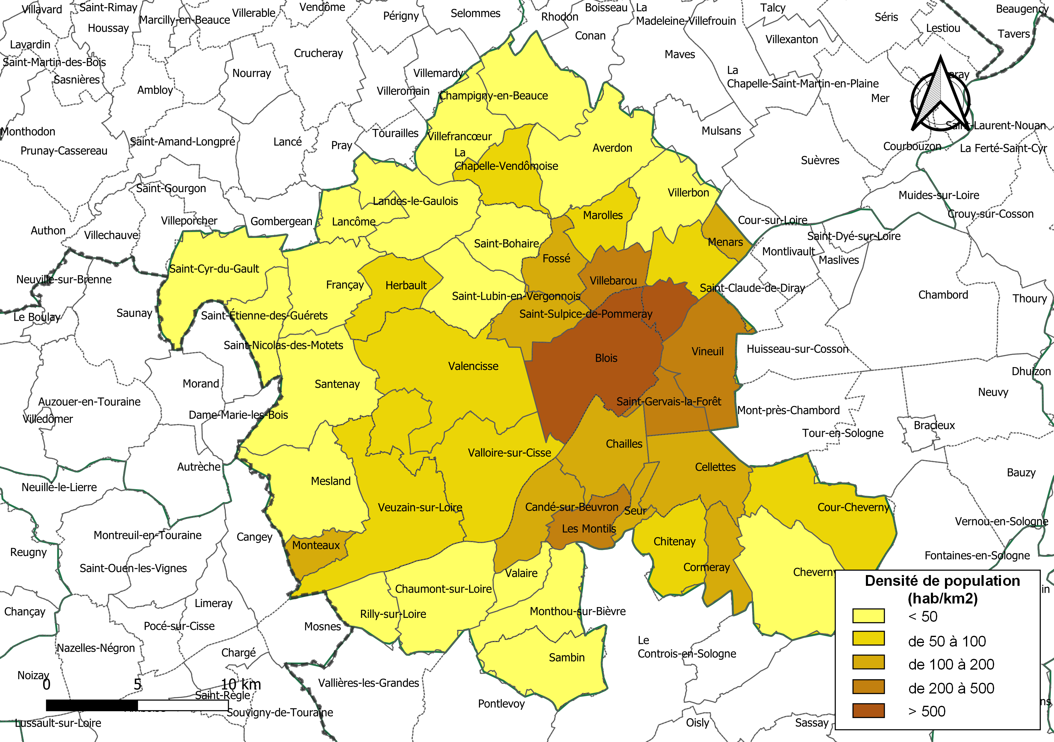 Carte des densités de population (millésimée 2016) des communes de la communauté de communes la Communauté d'agglomération de Blois « Agglopolys », département de Loir-et-Cher, France. Composition au 1er janvier 2019.